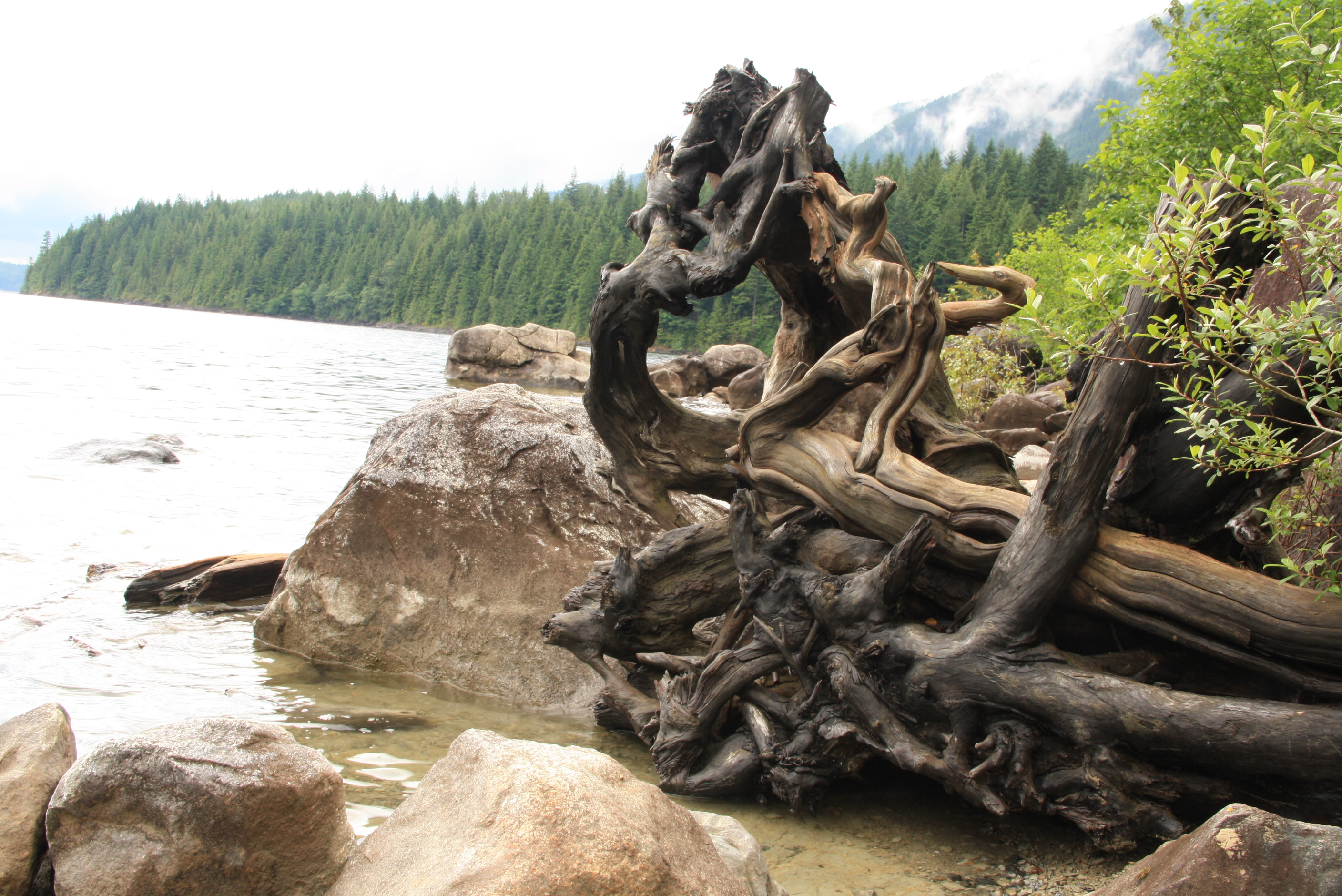 Alouette Lake im Golden Ears Provincial Park